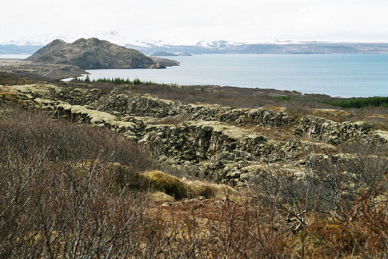 Þingvallavatn, Island. Es zeigt Spalten am Þingvallavatn in Island.